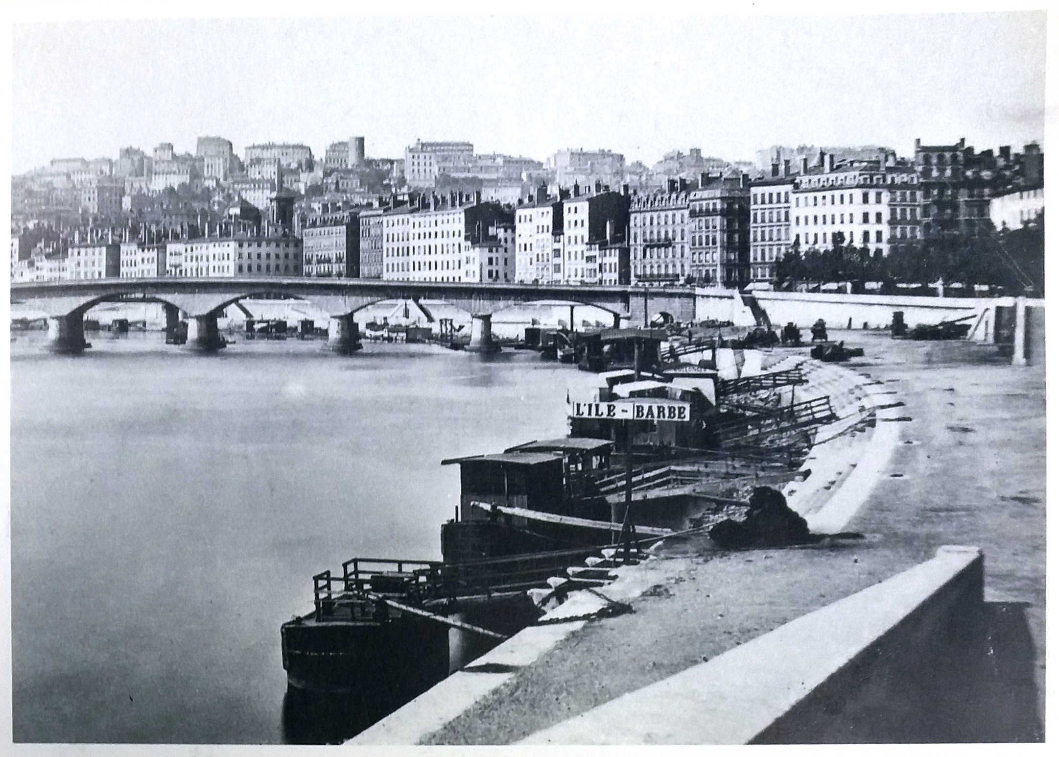 Photo du pont du change prise depuis le quai Saint-Antoine, avec la technique du collodion humide, vers 1870. Au fond, la tour d'observation de 50 mètres de haut édifiée par Antoine-Mathieu Pitrat entre 1827 et 1828, qui s'écroule le 27 août 1828 ; reconstruite sur une hauteur de 25 mètres, elle est définitivement démolie en 1875. Photo extraite du livre de Guy Borgé, Lyon passé et présent sous le même angle, page 24 (éditions Champion, Paris, 1987).